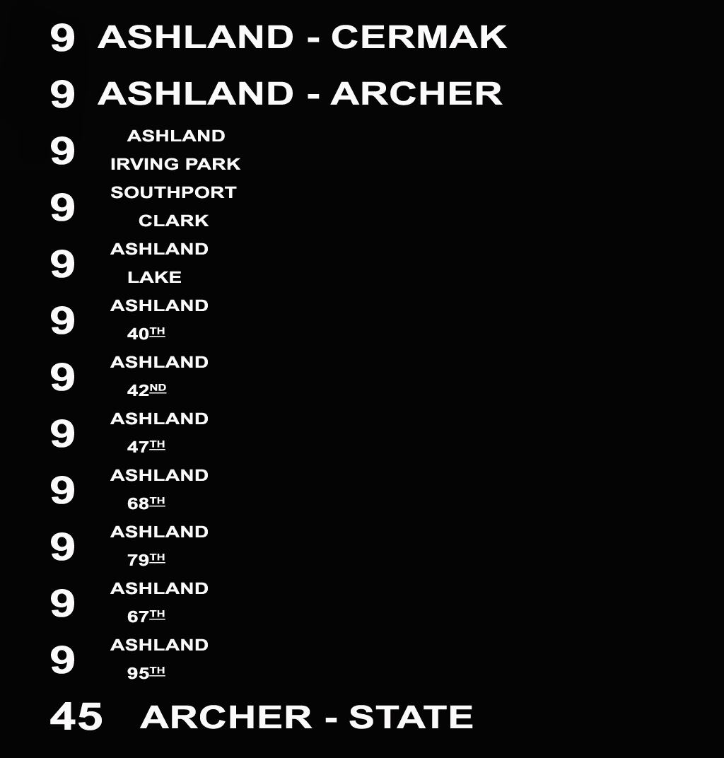 Zelfgemaakte media in Photoshop CS